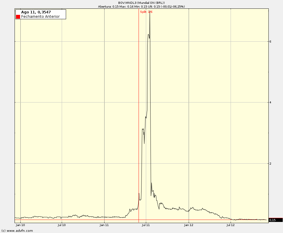 Gráfico acionário da Mundial SA entre dezembro de 2009 e dezembro de 2012